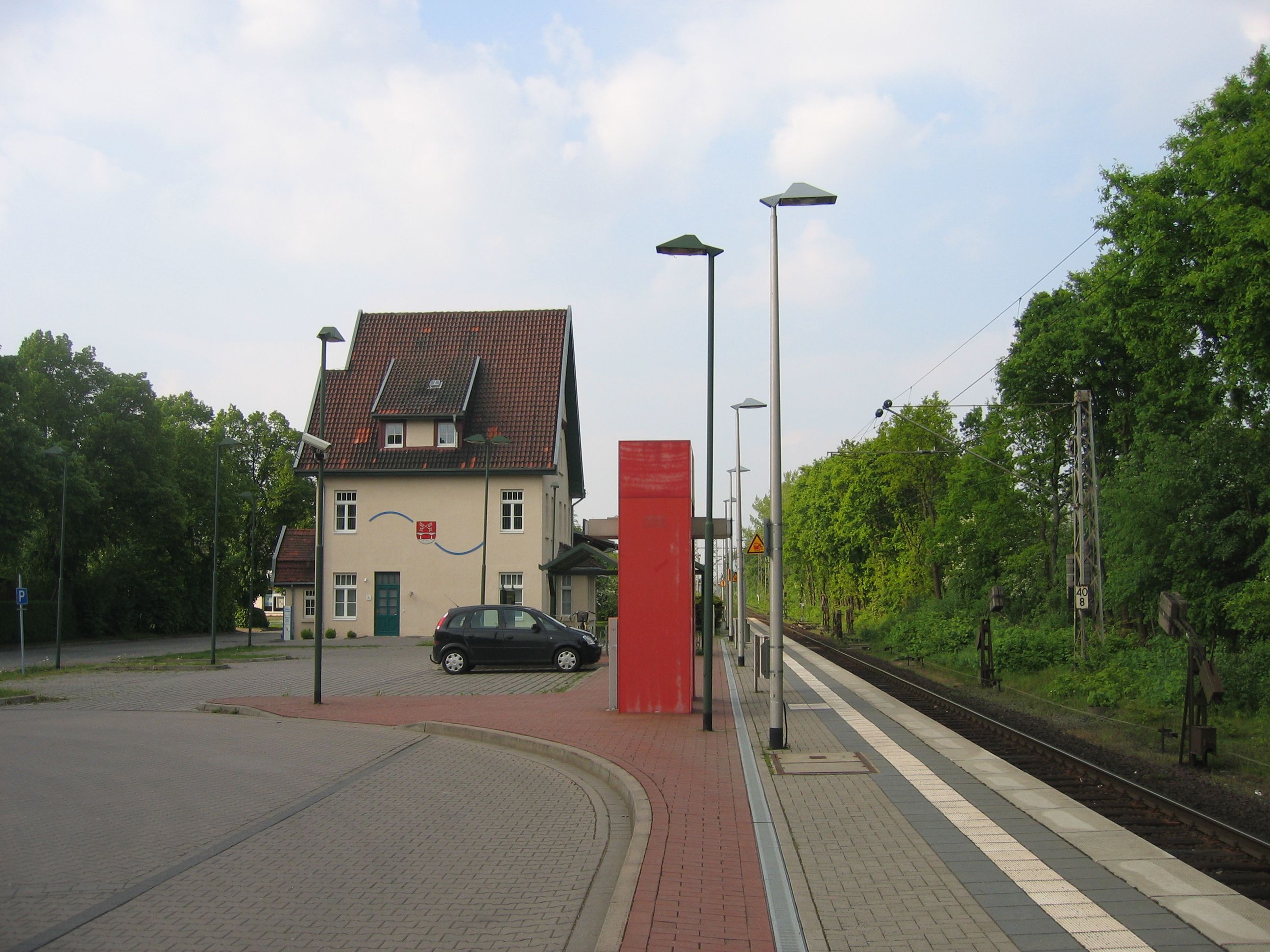 Bahnhof Petershagen-Lahde im Kreis Minden-Lübbecke